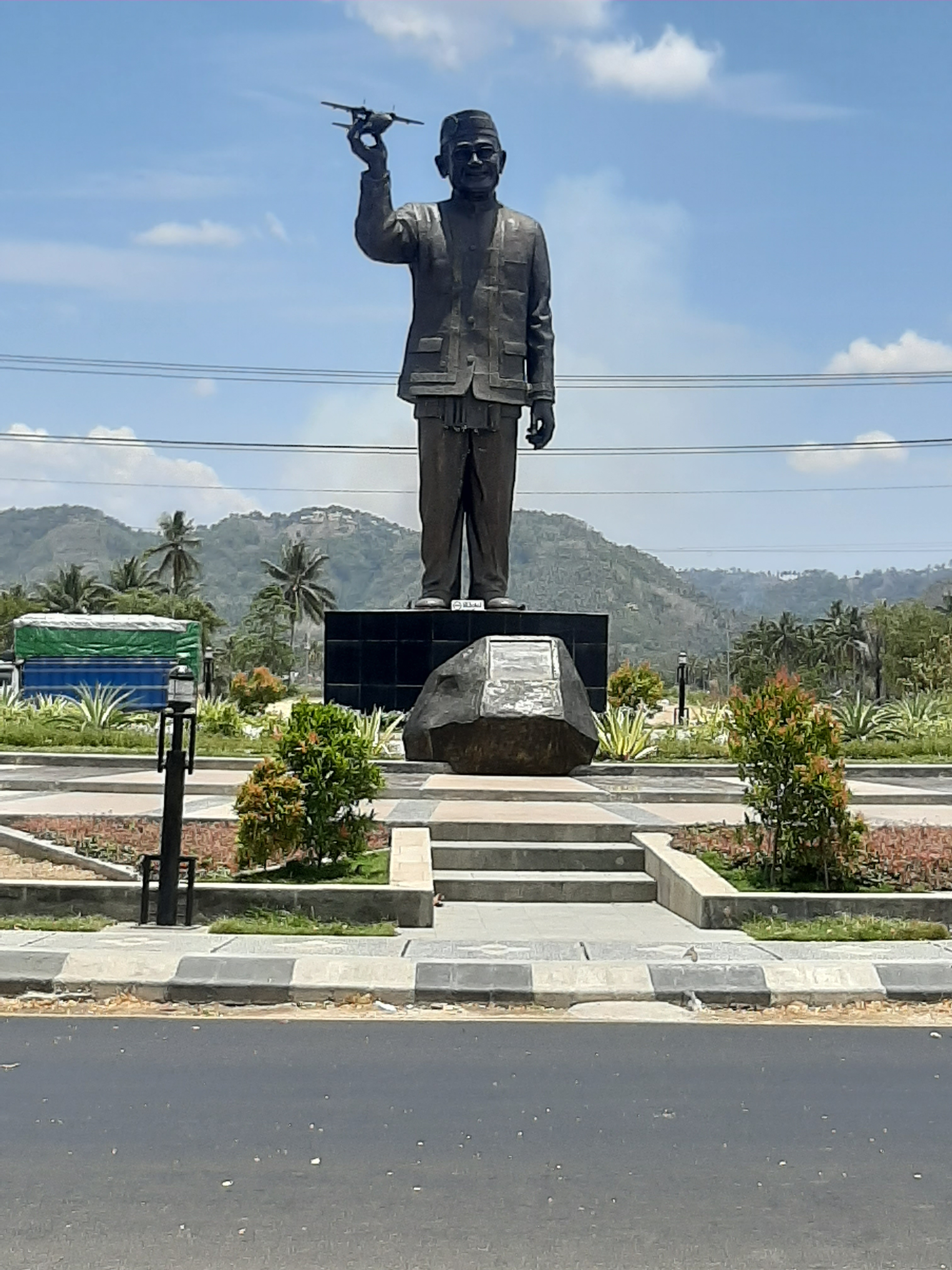 Patung BJ Habibie di Provinsi Gorontalo